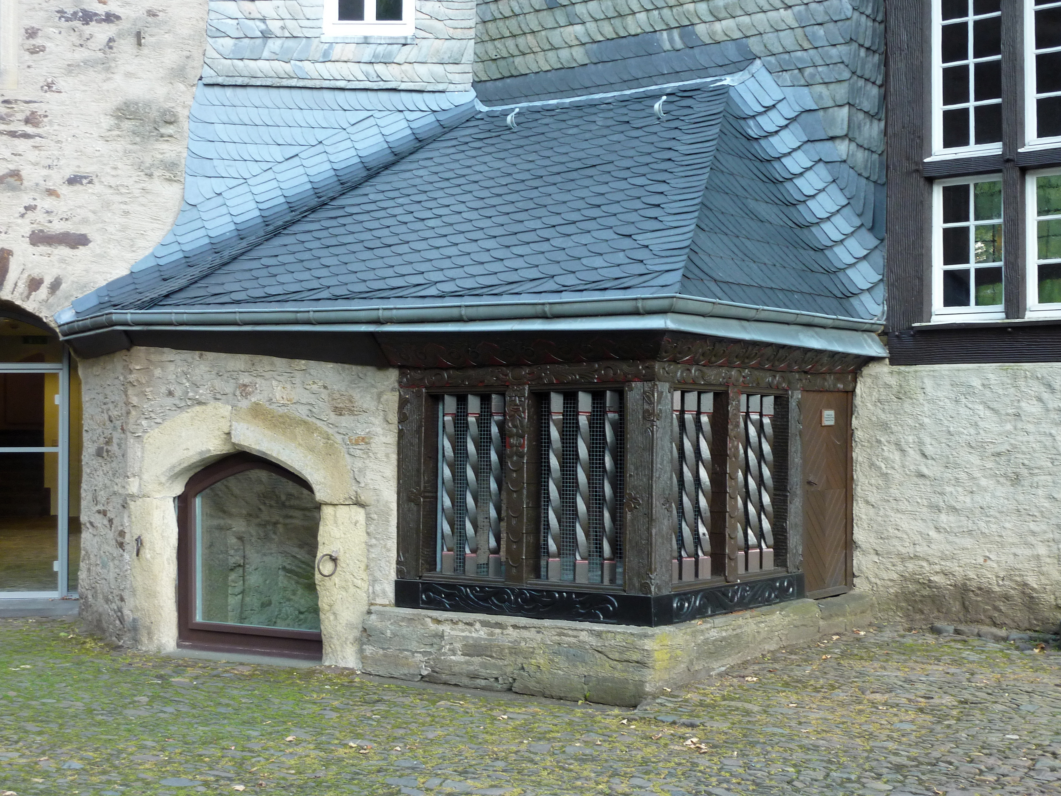 Oberes Schloss in Siegen/Westfalen: Brunnenhaus an der Ostseite des inneren Hofes. Ansicht von Westen.